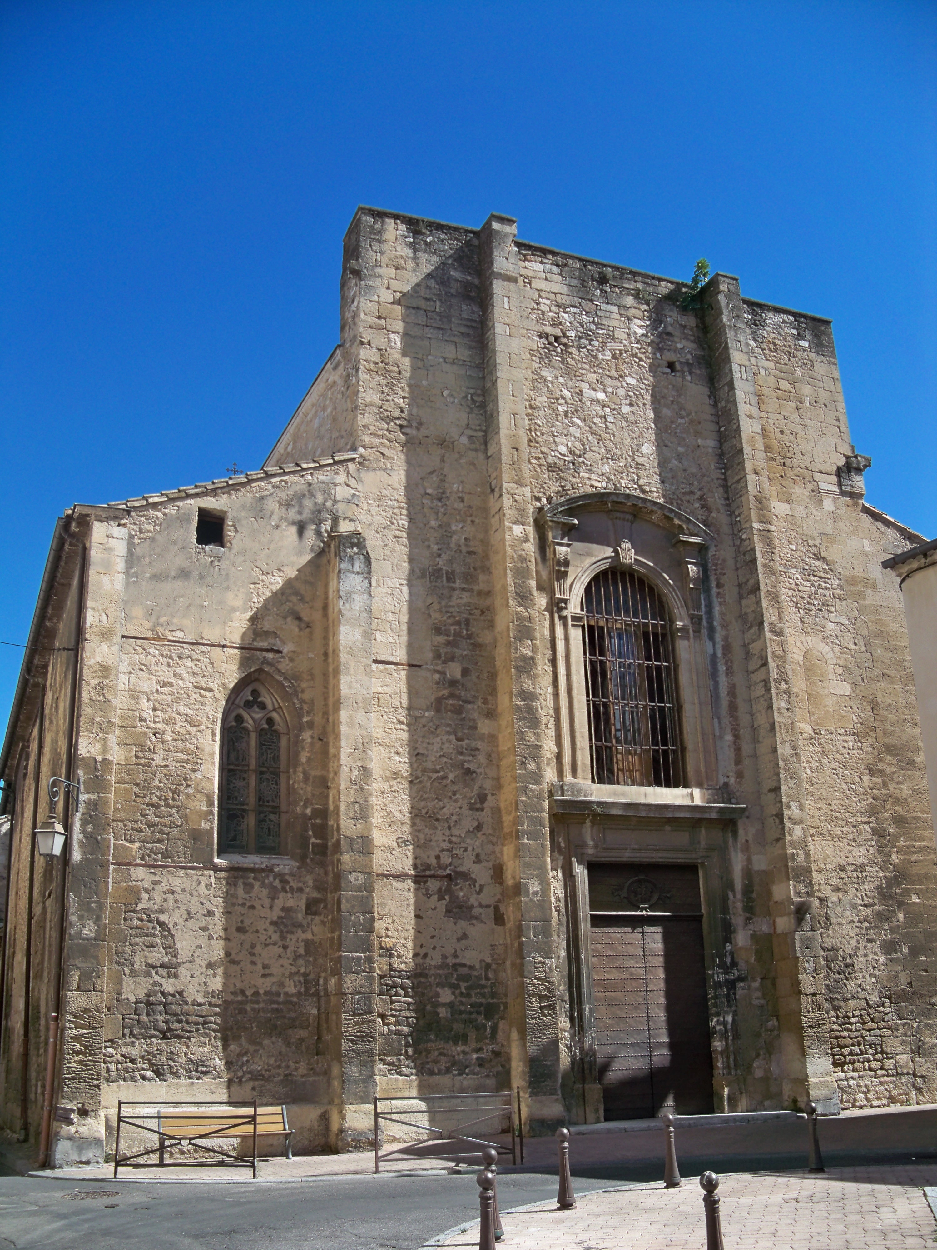 Facade de l'église Saint Véran de Cavaillon, Vaucluse, France